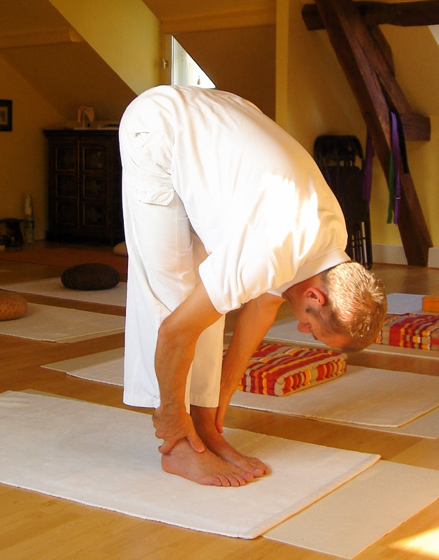 Yoga postures